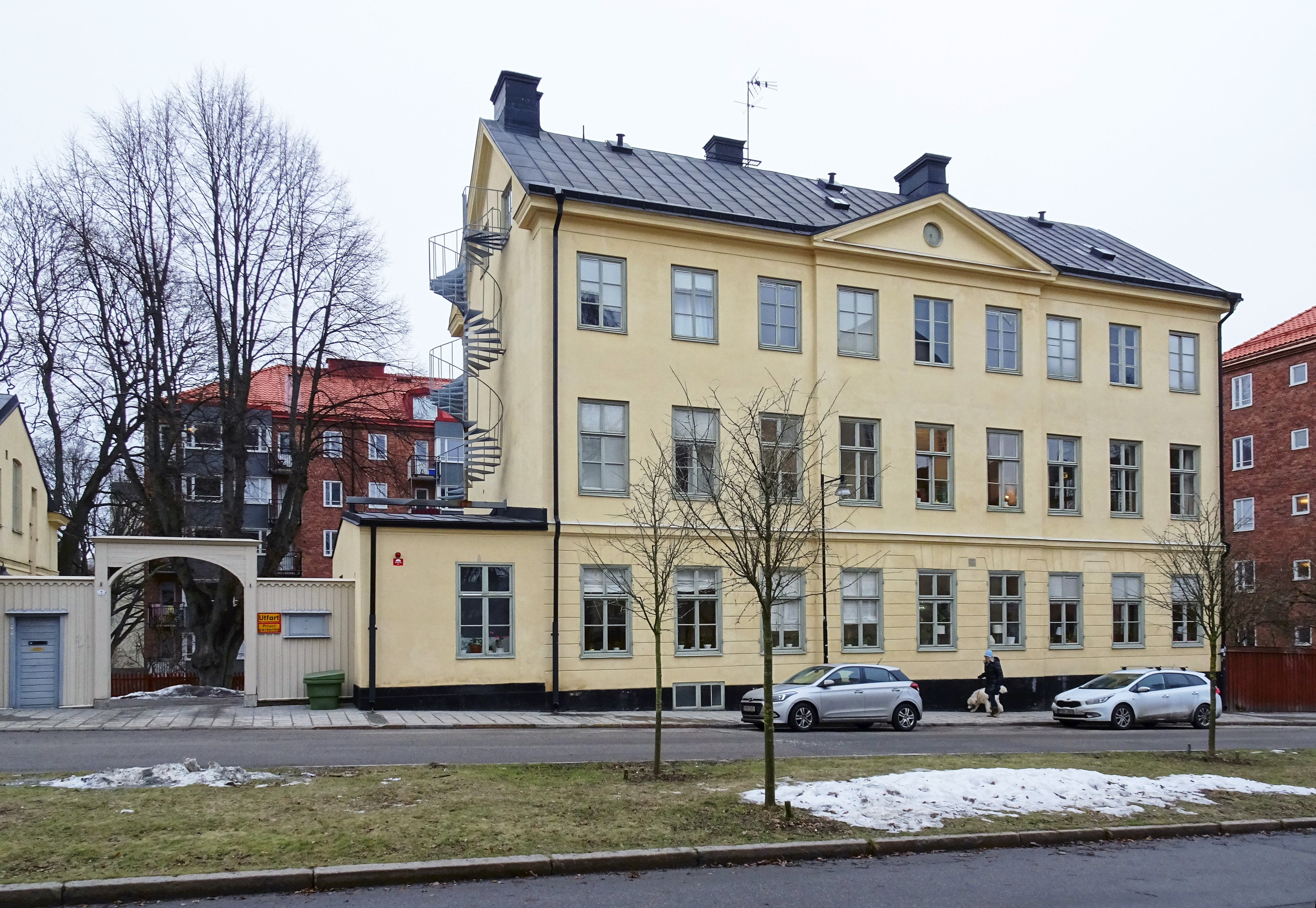 Gaveliusgatan 7, Sofia ungdomshem. Tidigare Barnängens flickhem (1779), sedan Stockholms stads uppfostringsanstalt för flickor, idag Behandlingshemmet Södermalm. Johan Wilhelm Elvies (Arkitekt), (påbyggd 1886)